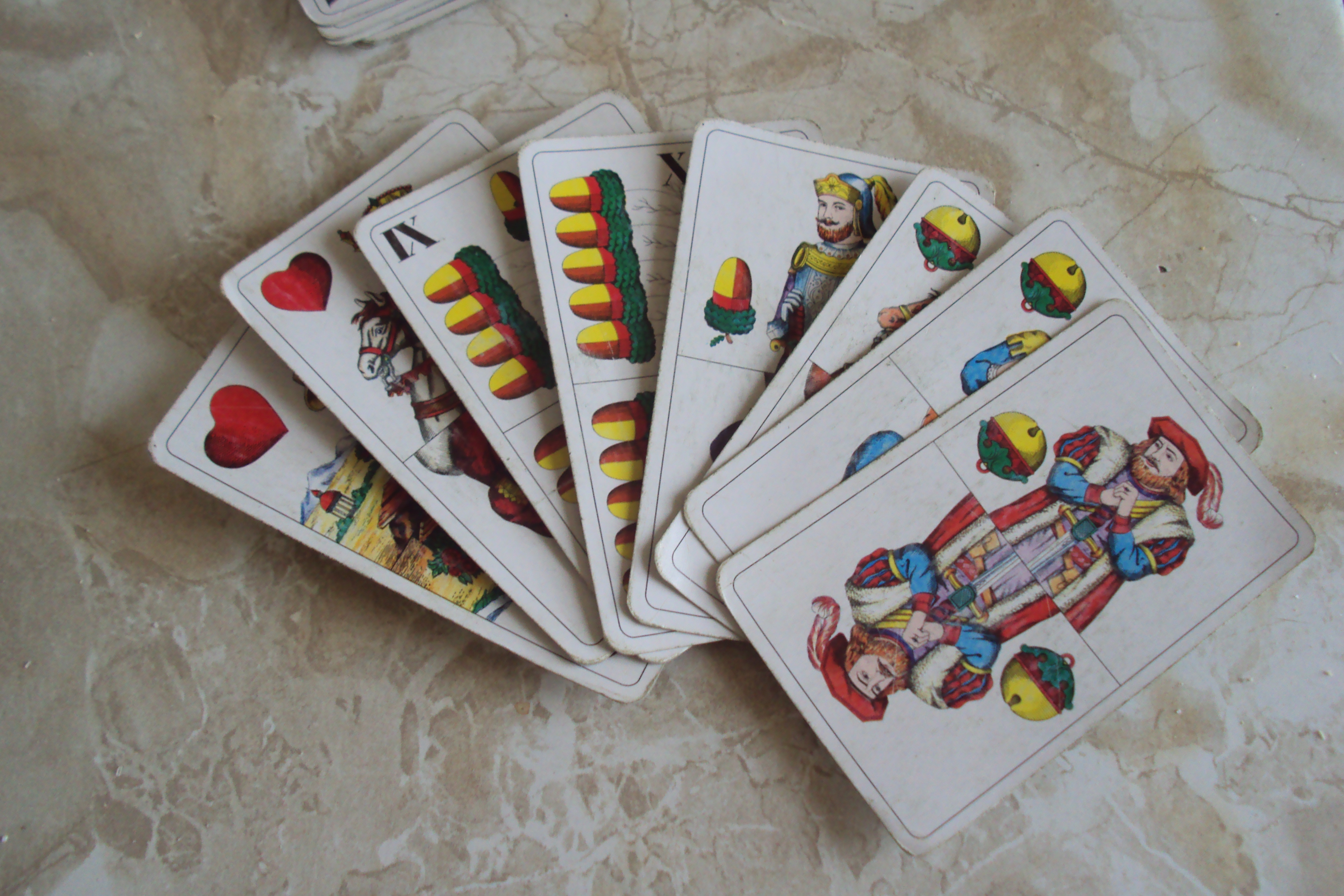 Možná sestava rozdaných karet německého typu třeba v dudáku